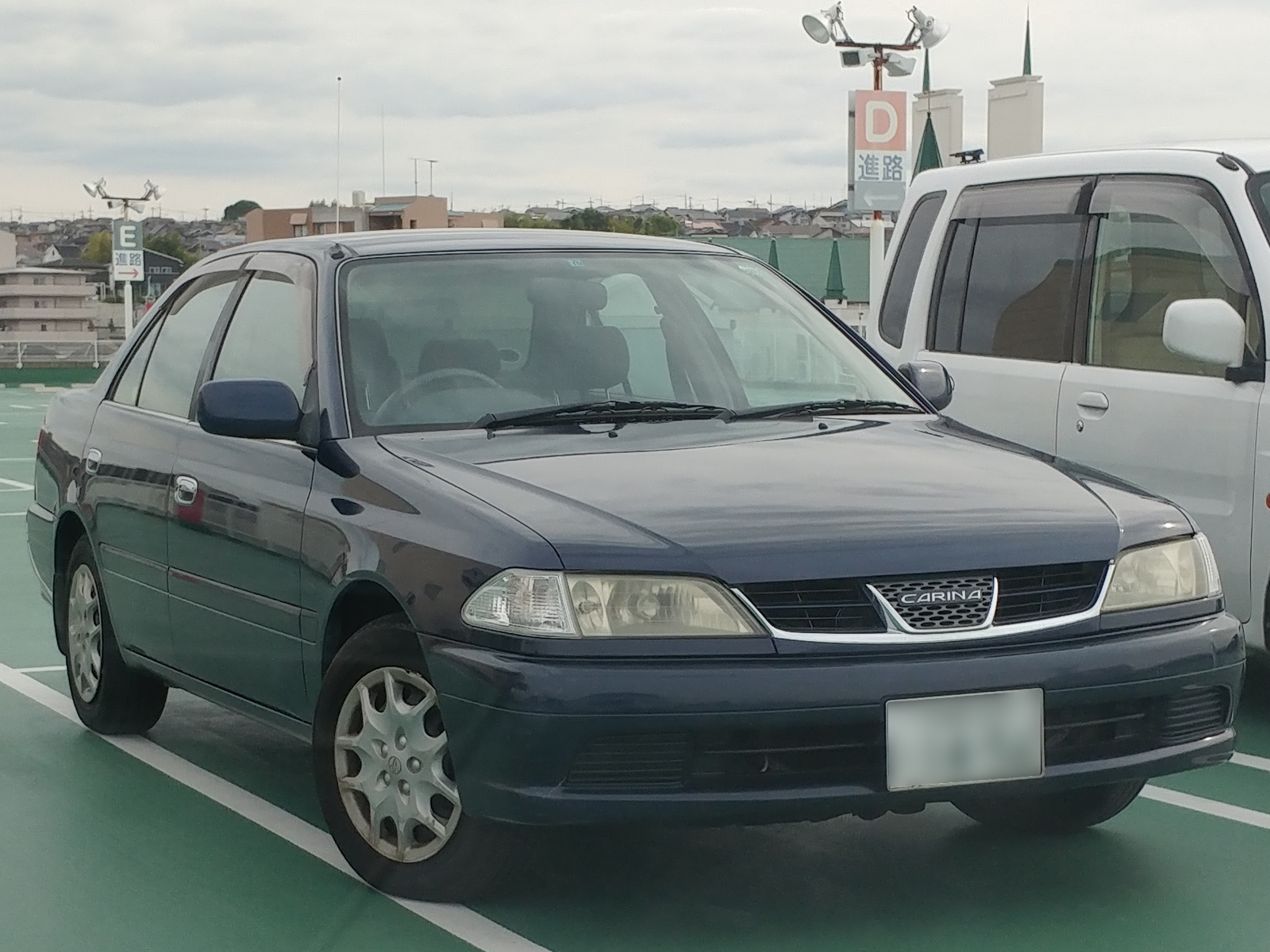 カリーナ Tiマイロード プレミアム21（後期型）